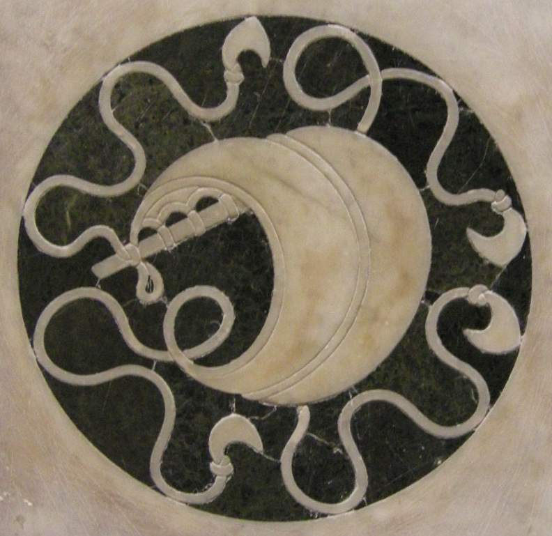 Tempietto, formelle 09 impresa personale di giovanni rucellai